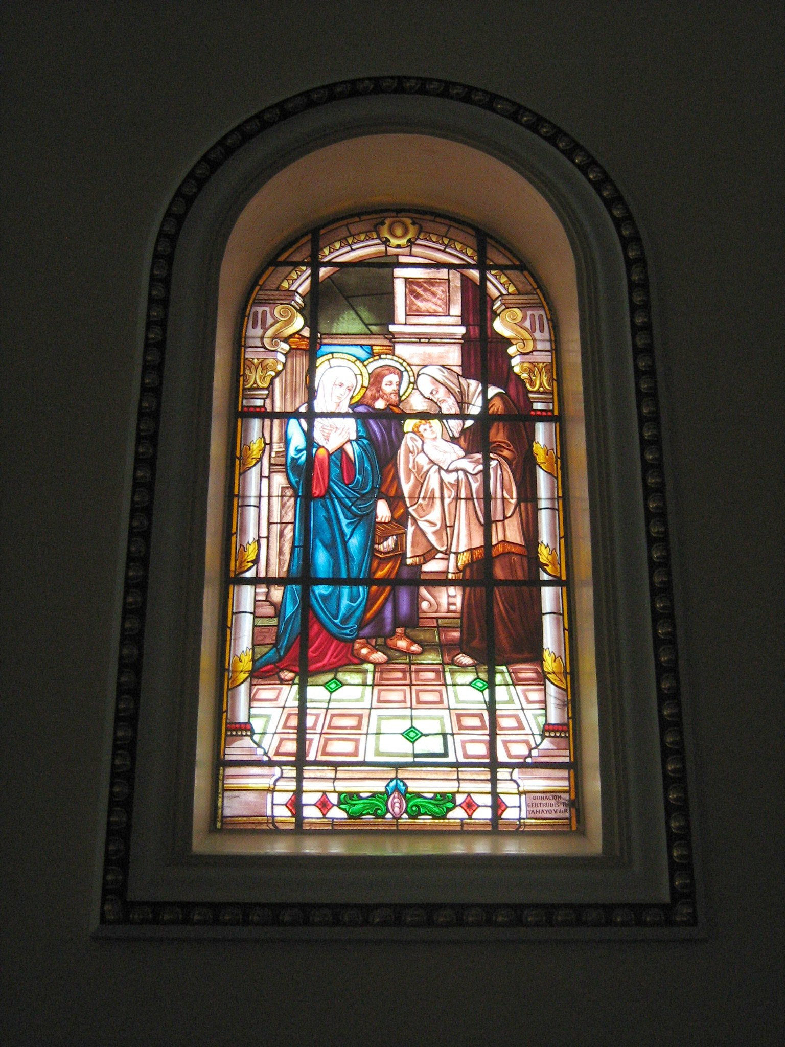 Basílica Menor del Señor de los Milagros del municipio de San Pedro de los Milagros, Antioquia. Colombia.